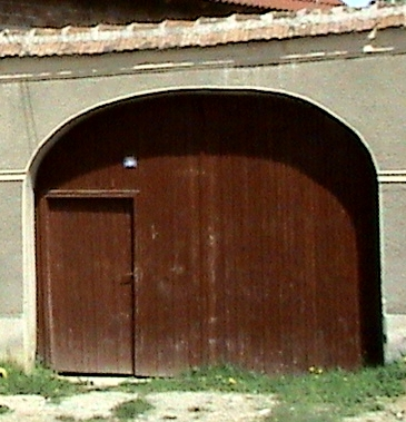 Poartă cu portiţă din Racoviţa, Sibiu.